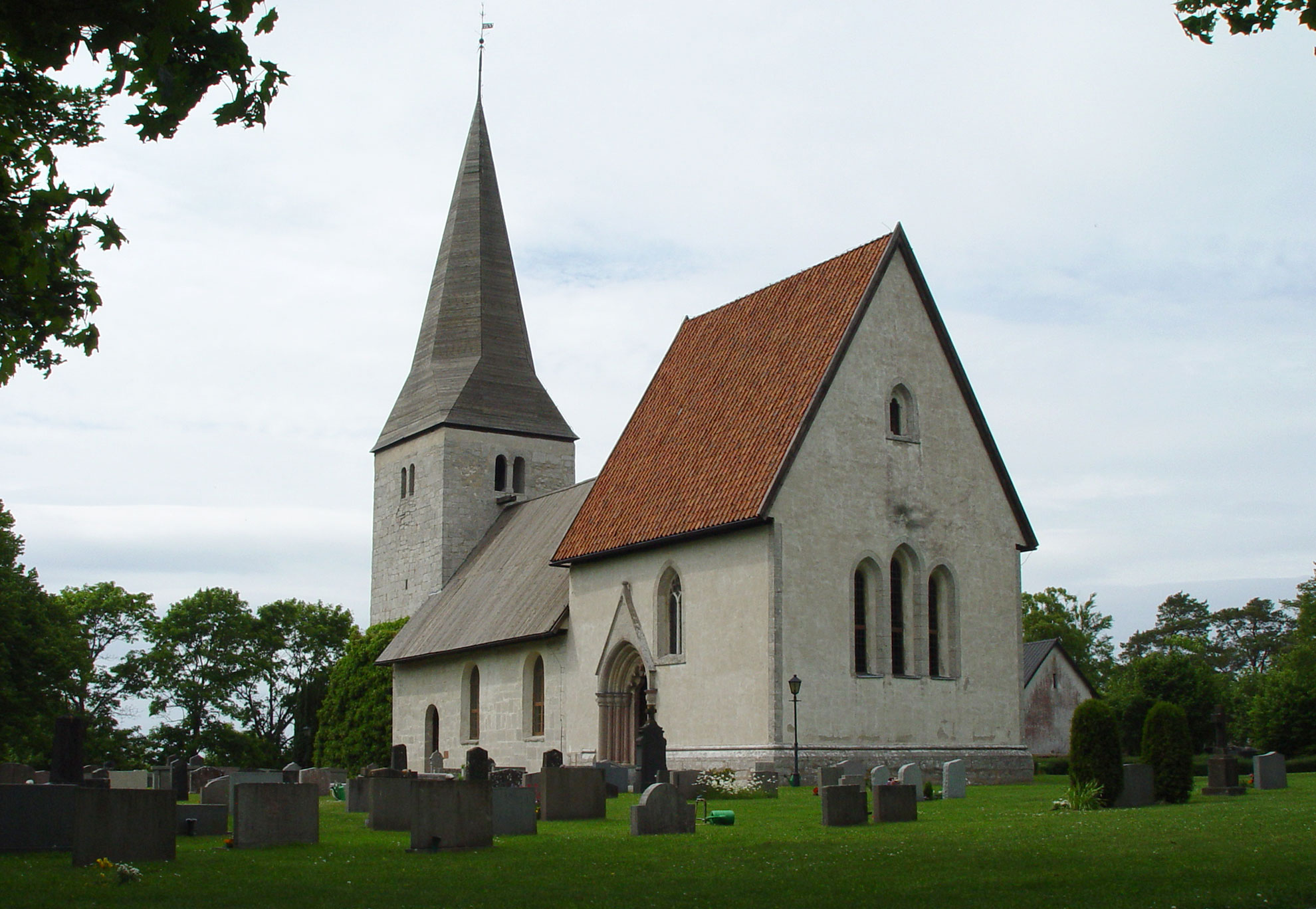 Fröjel-Kirche auf Gotland. Langhaus (12.Jh.), Turm (Anfang 13.Jh.), Chor (um 1300)